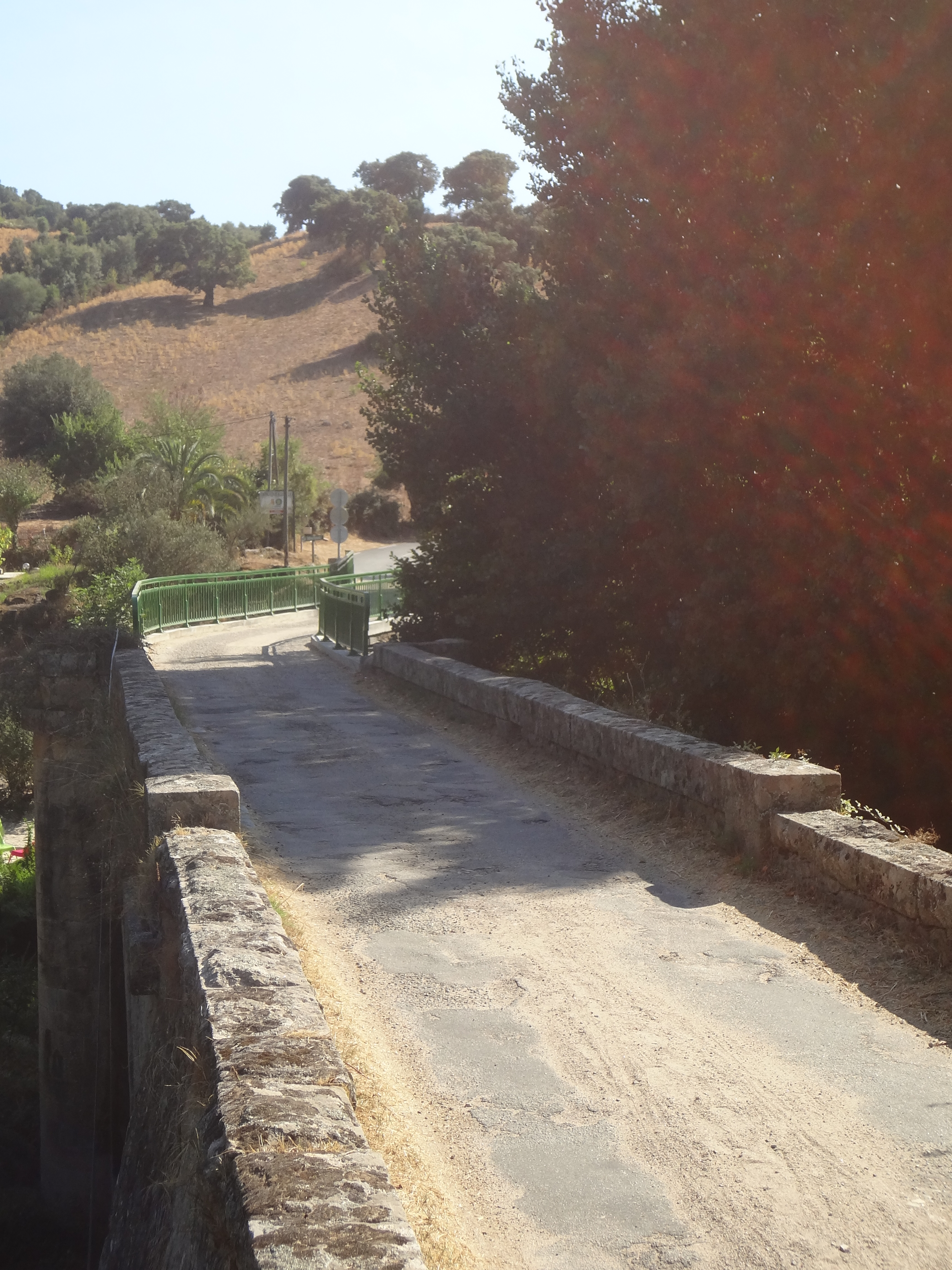 Pont de Calzola, Pila-Canale, Corse